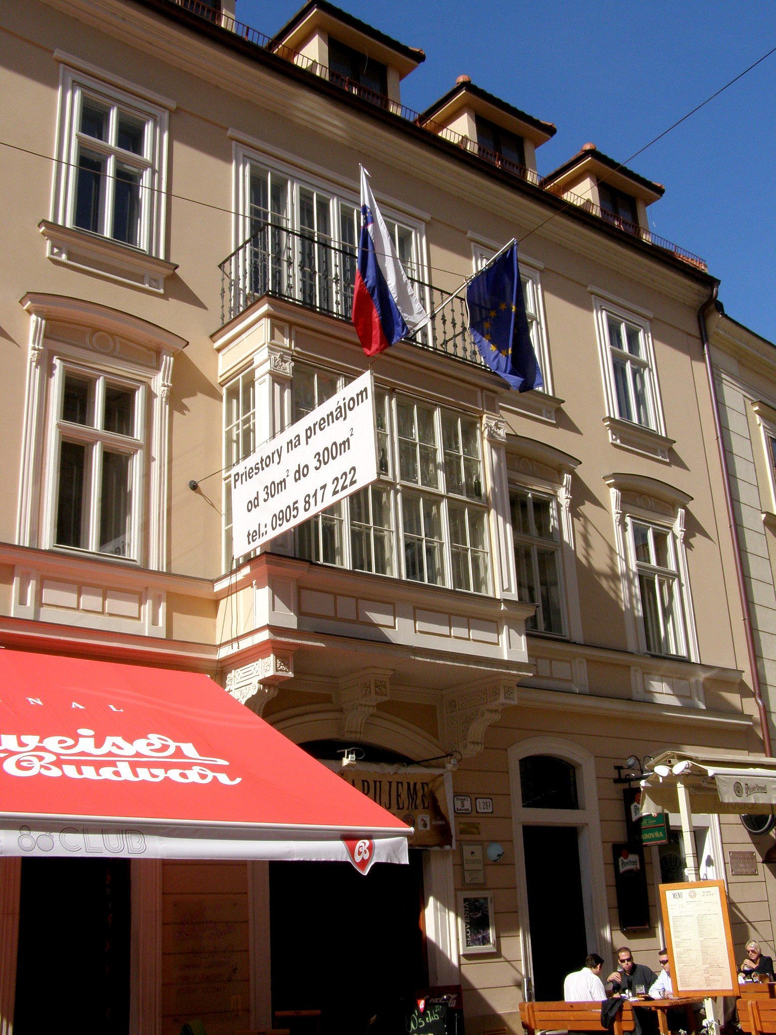 Ventúrska ul. č. 5. V dome od roku 1771 až do takmer polovice 20. stor. sídlila Patzkova tlačiareň. Priečelie pôvodného domu prestavali v polovici 19. stor. podľa projektu Ignáca Feiglera ml.